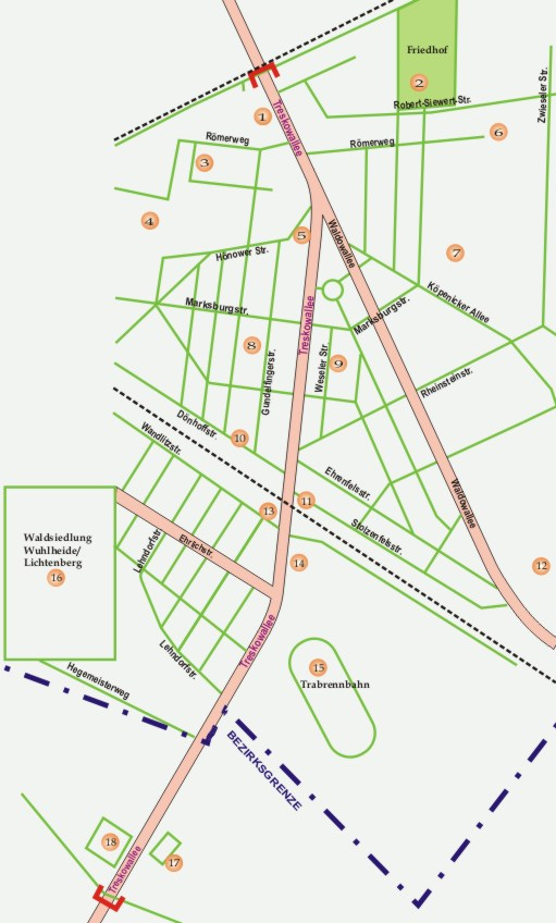 Lageplan der Treskowallee und der umgebenden Straßen